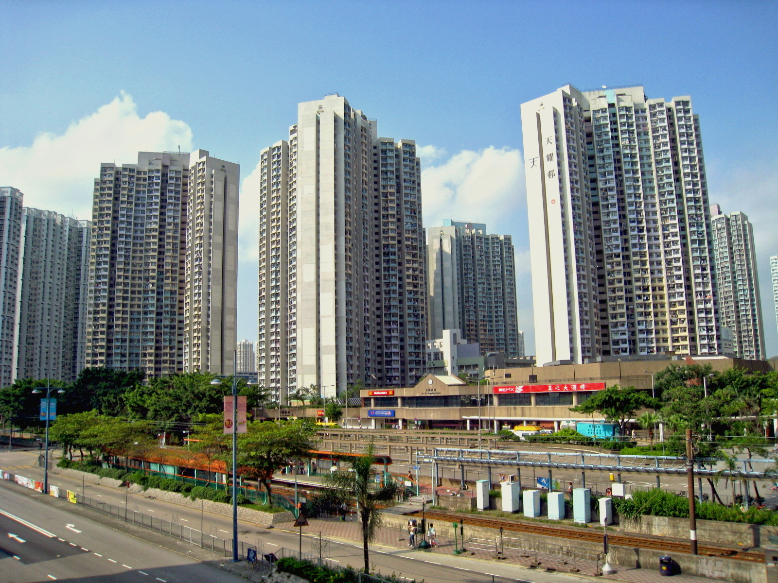 Tin Yiu Estate Phase 2 天耀邨